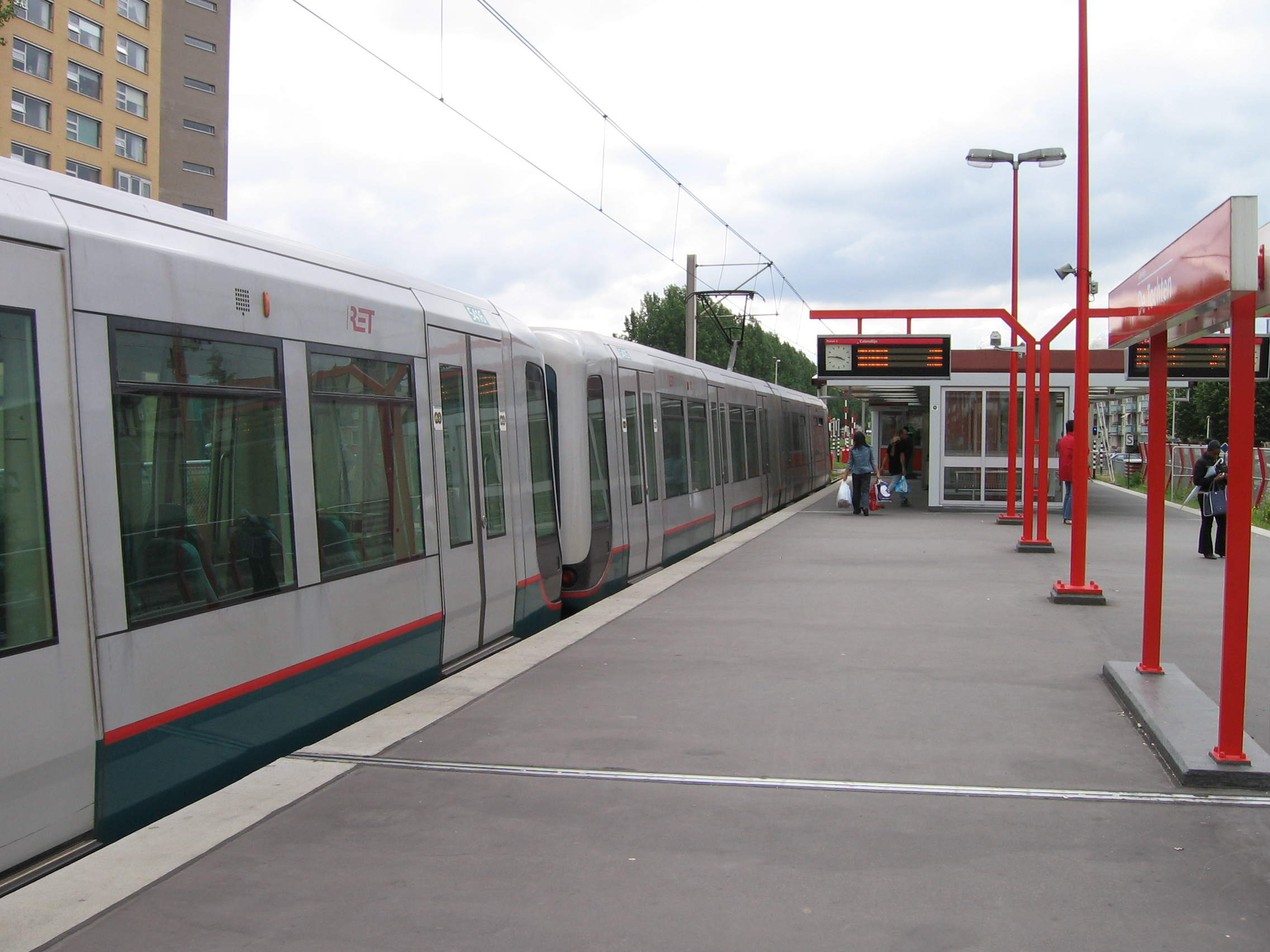 Metro/sneltram op perron 2 van station de Tochten.